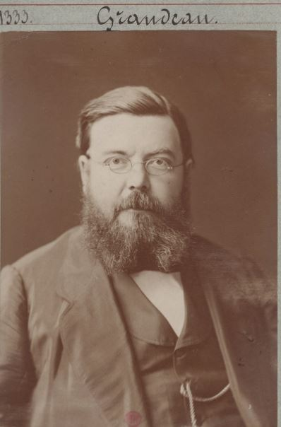 Louis Grandeau (1834-1911) par Atelier Nadar (1870-1890) 1 photogr. pos. sur papier albuminé : d'après nég. sur verre au gélatinobromure d'argent ; 14,5 x 10,5 cm